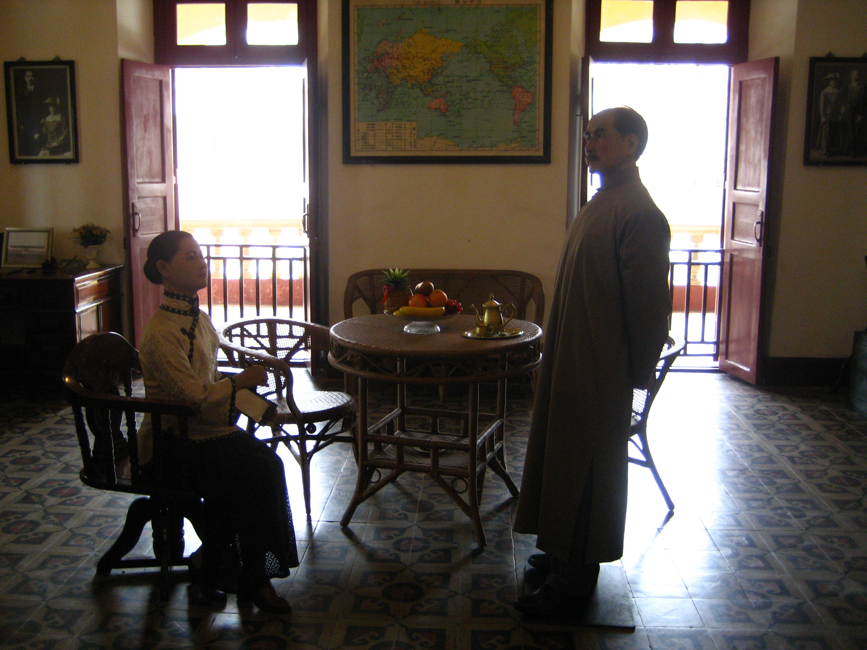 孫中山大元帥府紀念館里的孫中山臥室